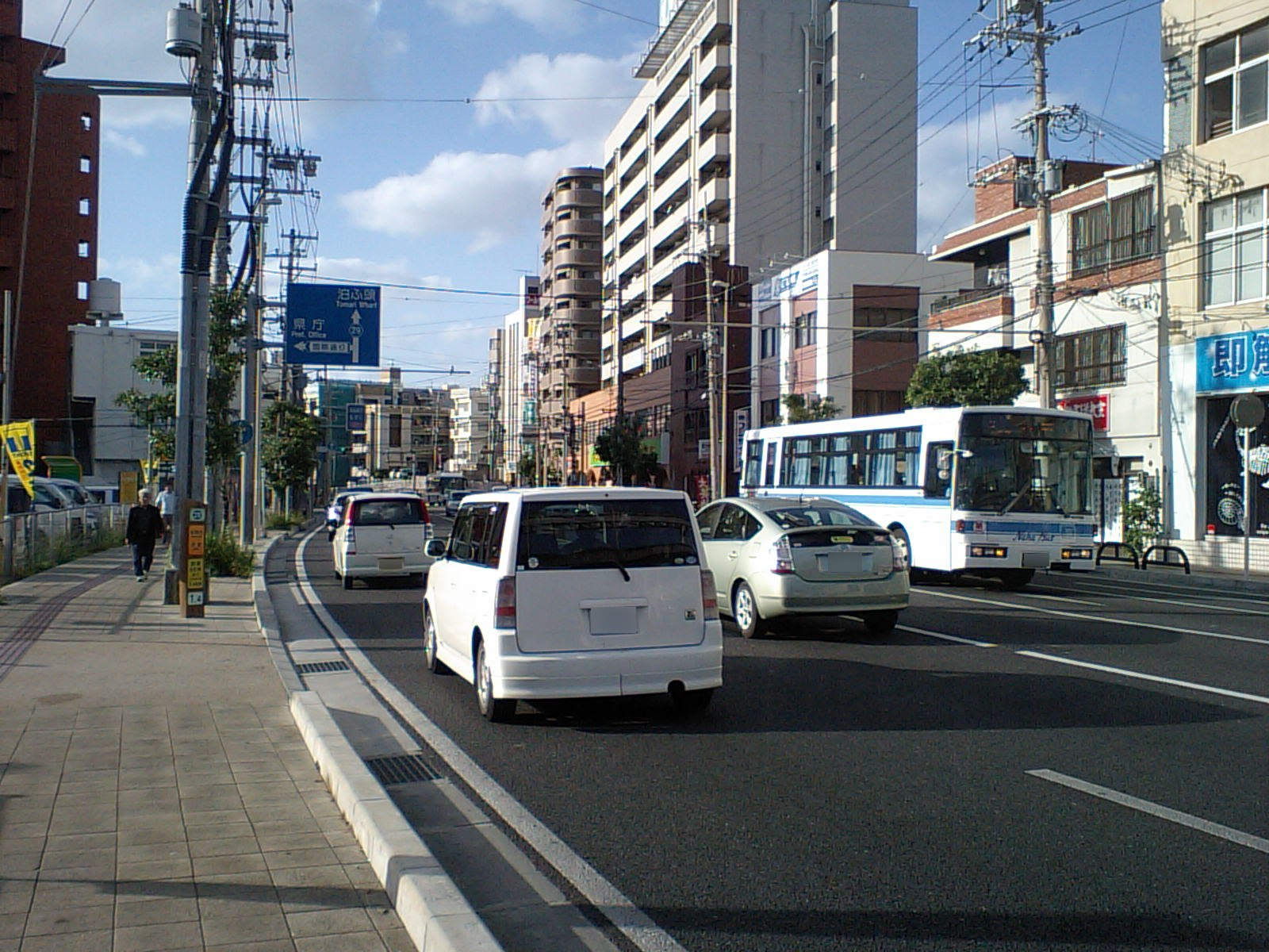 沖縄県那覇市安里の交差点南西角より、西方向、安里三叉路方向へ向けて携帯で撮影。時間は16時前でやや逆光。